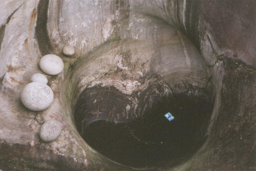 Pursialan hiidenkirnu Mikkelissä, vuonna 1965 löydetyn kirnun syvyys on 5 m 10 cm (24.5.2001).